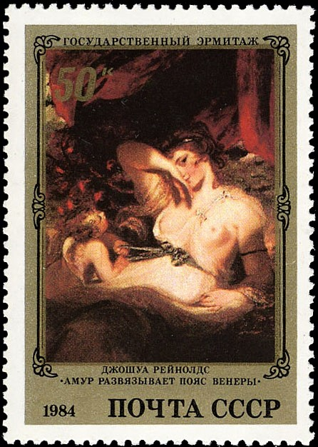 Почтовая марка СССР. Джошуа Рейнолдс. «Амур развязывает пояс Венеры». Номер в каталоге ЦФА 5487